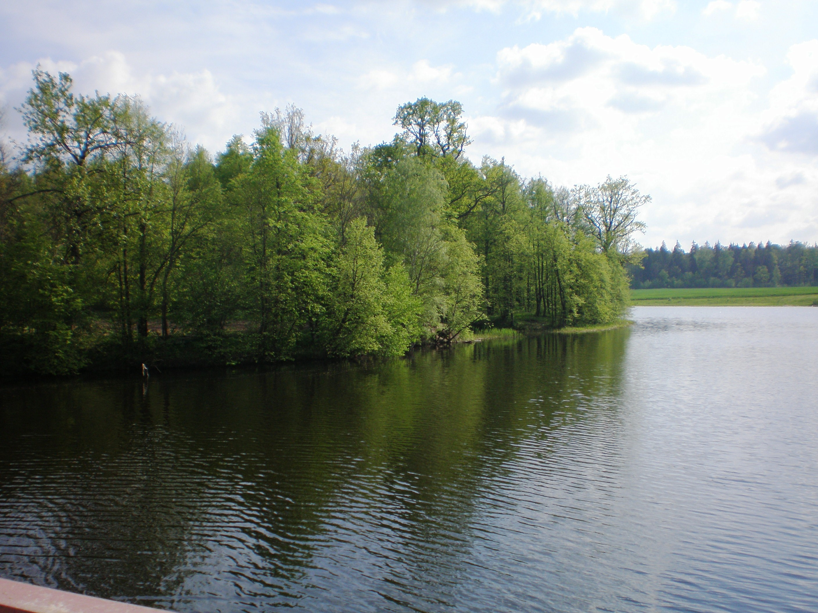 Smilgaitis. Keleriškių tvenkinys Foto: Hugo.arg 2007.05.18